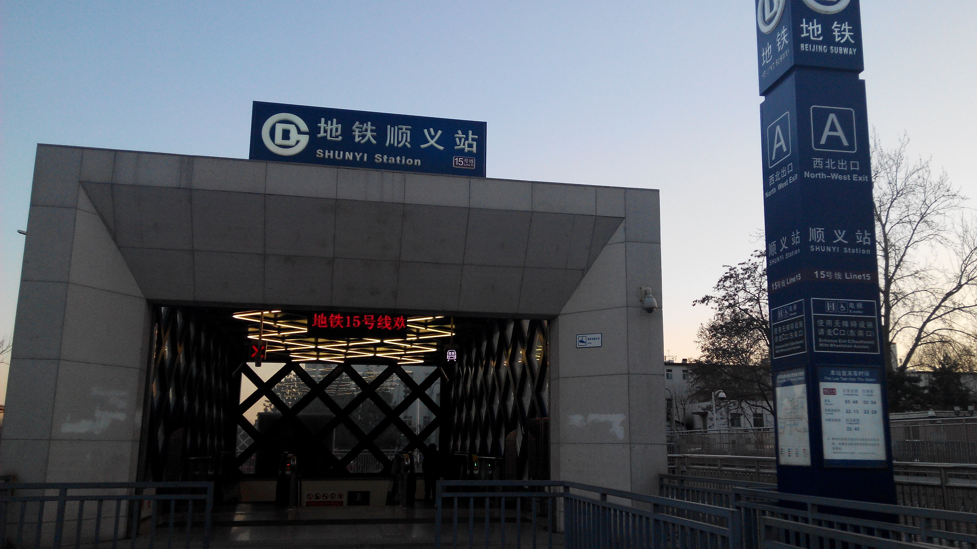 北京地铁15号线顺义站A口